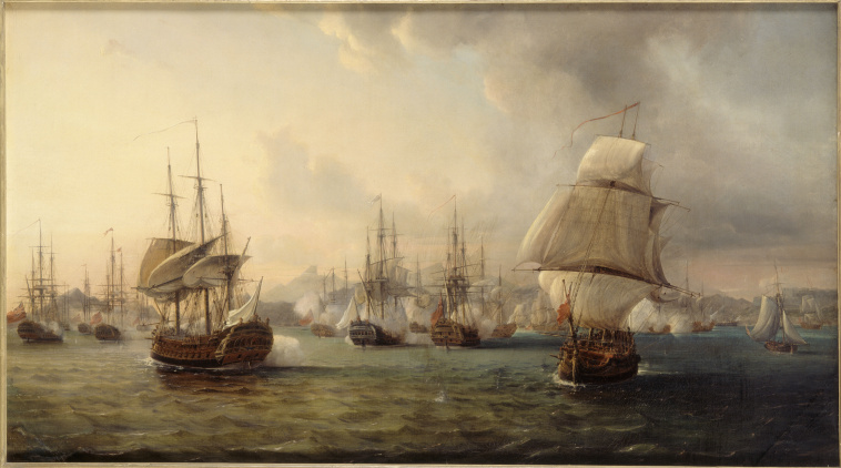 Battle of Porto Prayalabel QS:Len,"Battle of Porto Praya" label QS:Lfr,"Combat de la baie de la Praya dans l'île de San Iago au Cap Vert, le16 avril 1781"